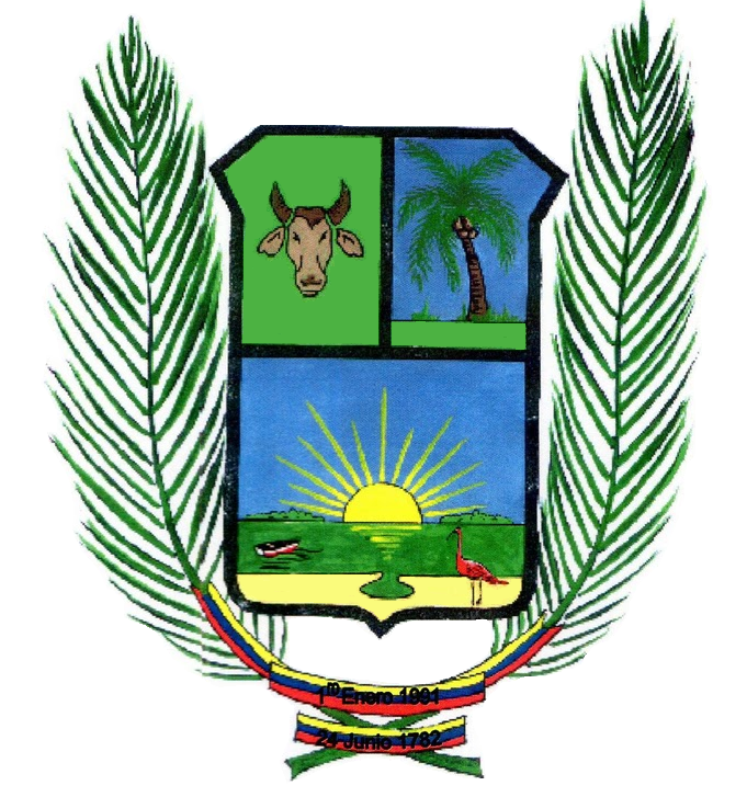 Escudo del municipio Acosta, estado Falcón, Venezuela